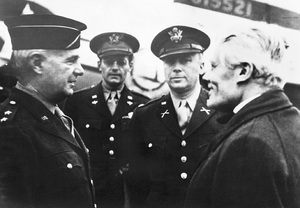 General William Donovan, chef for OSS, oberst John Bross, daværende leder af OSS i London, Kai Winkwlhorn, leder af OSS-missionen i Danmark og udenrigsminister i befrielsesregeringen, John Christmas Møller.v Sted: Kastrup Lufthavn Dato: Oktober 1945 Se flere billeder her: Rights: More about The Museum of Danish Resistance (Frihedsmuseet)